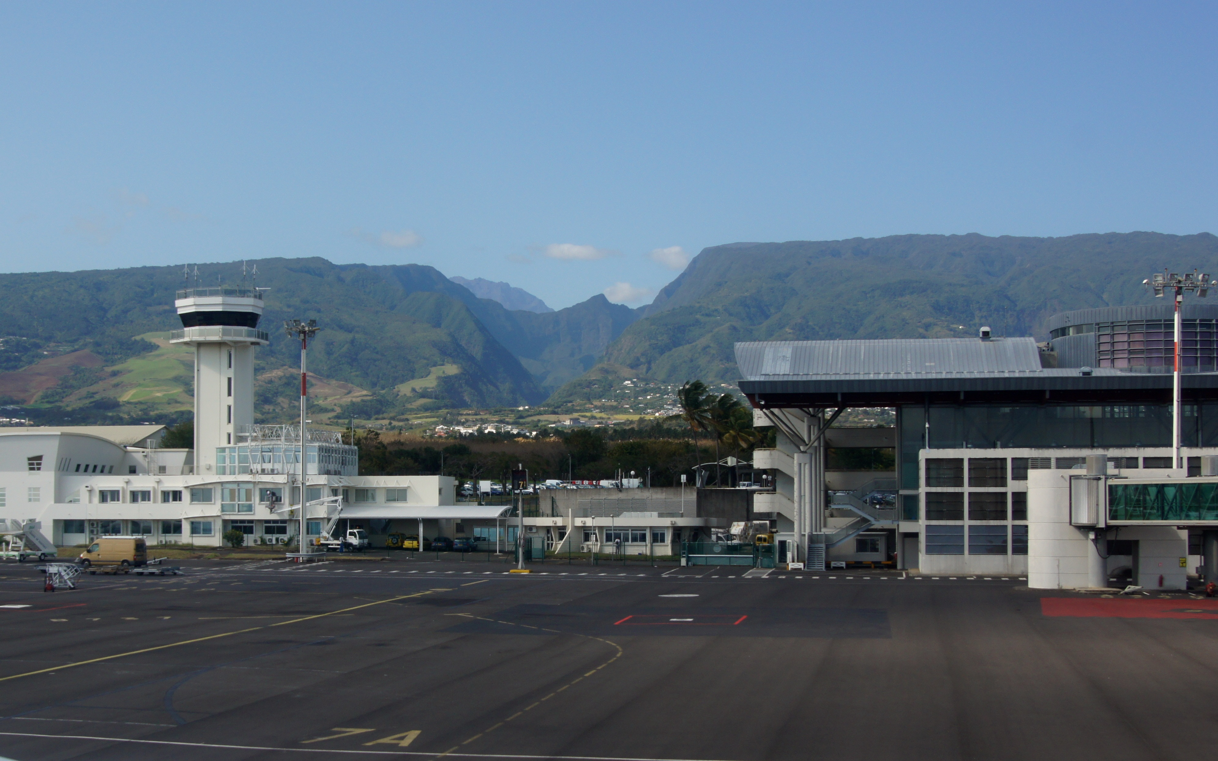 Terminal RUN/FMEE